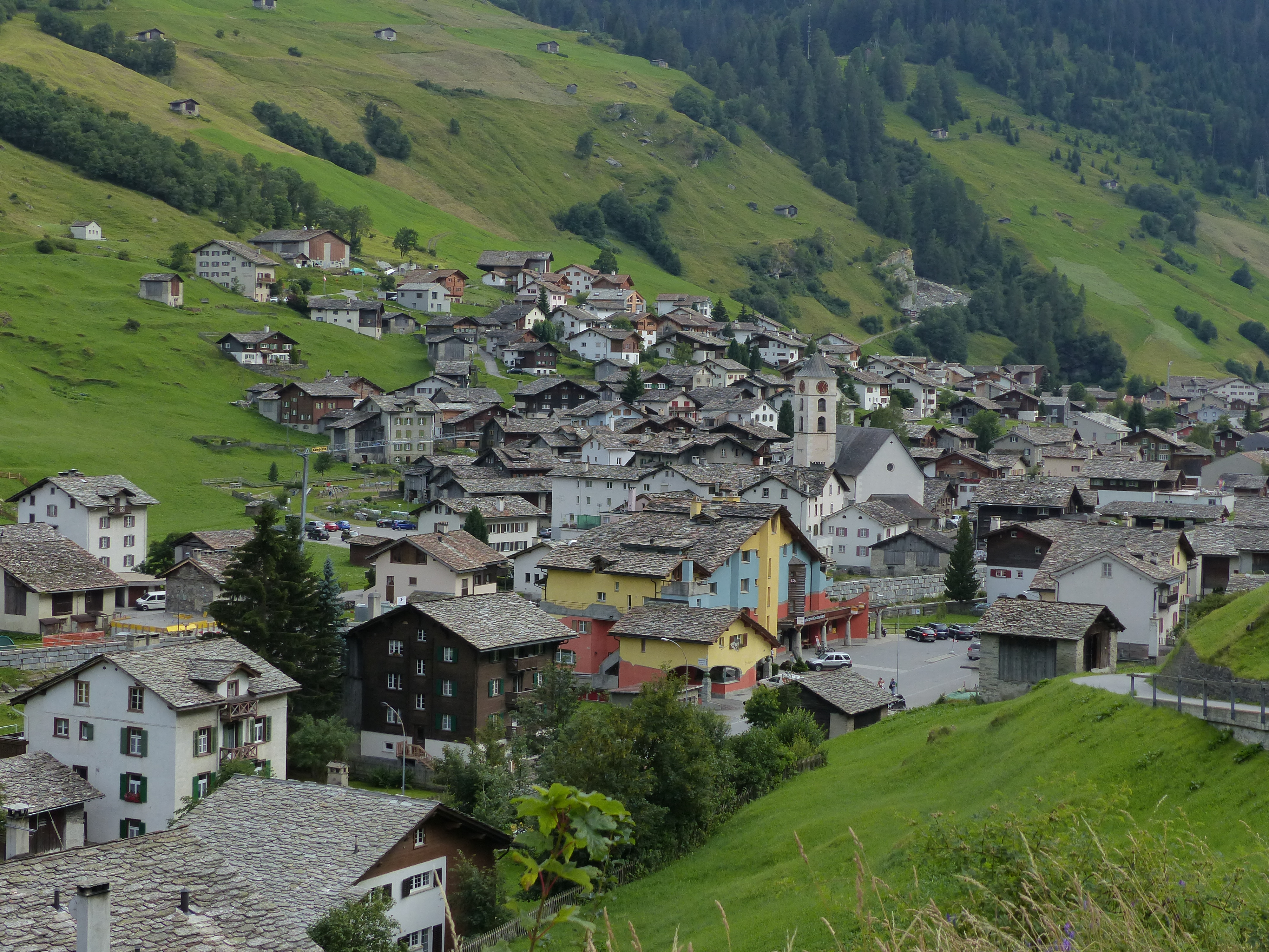 Vals